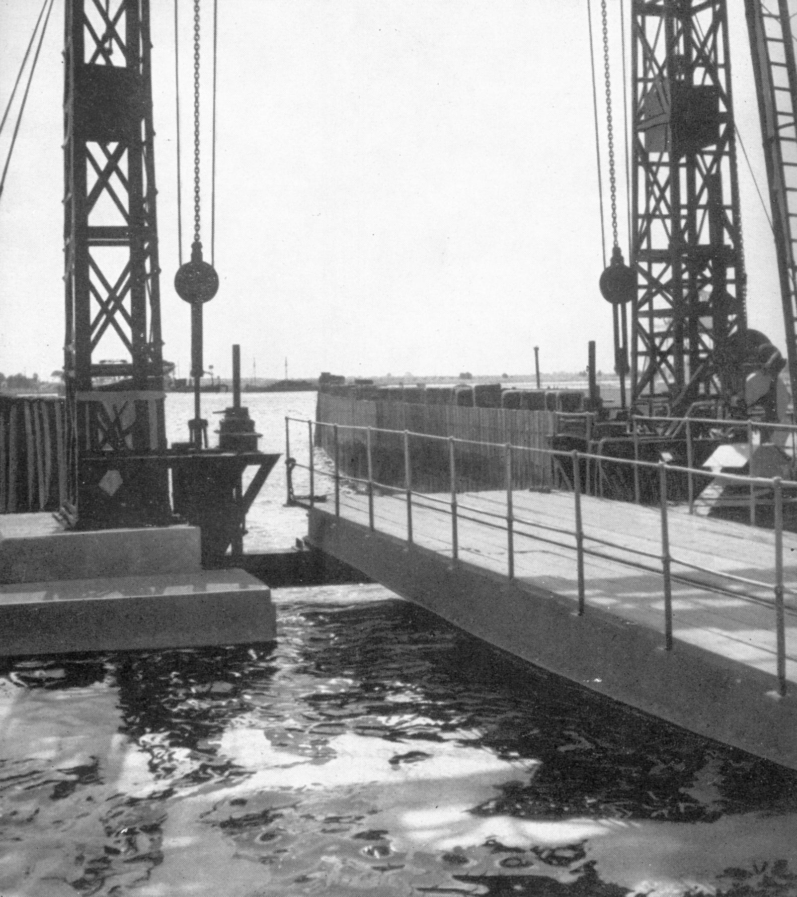 Wittower Fähre Bahnauffahrtrampe